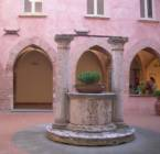 Chiostro ex Monastero di San Benedetto dei Condotti attualmente sede ADISU